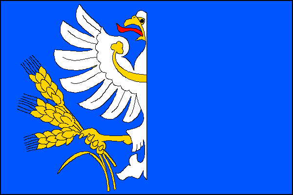 vlajka, Sedlečko u Soběslavě, okres Tábor